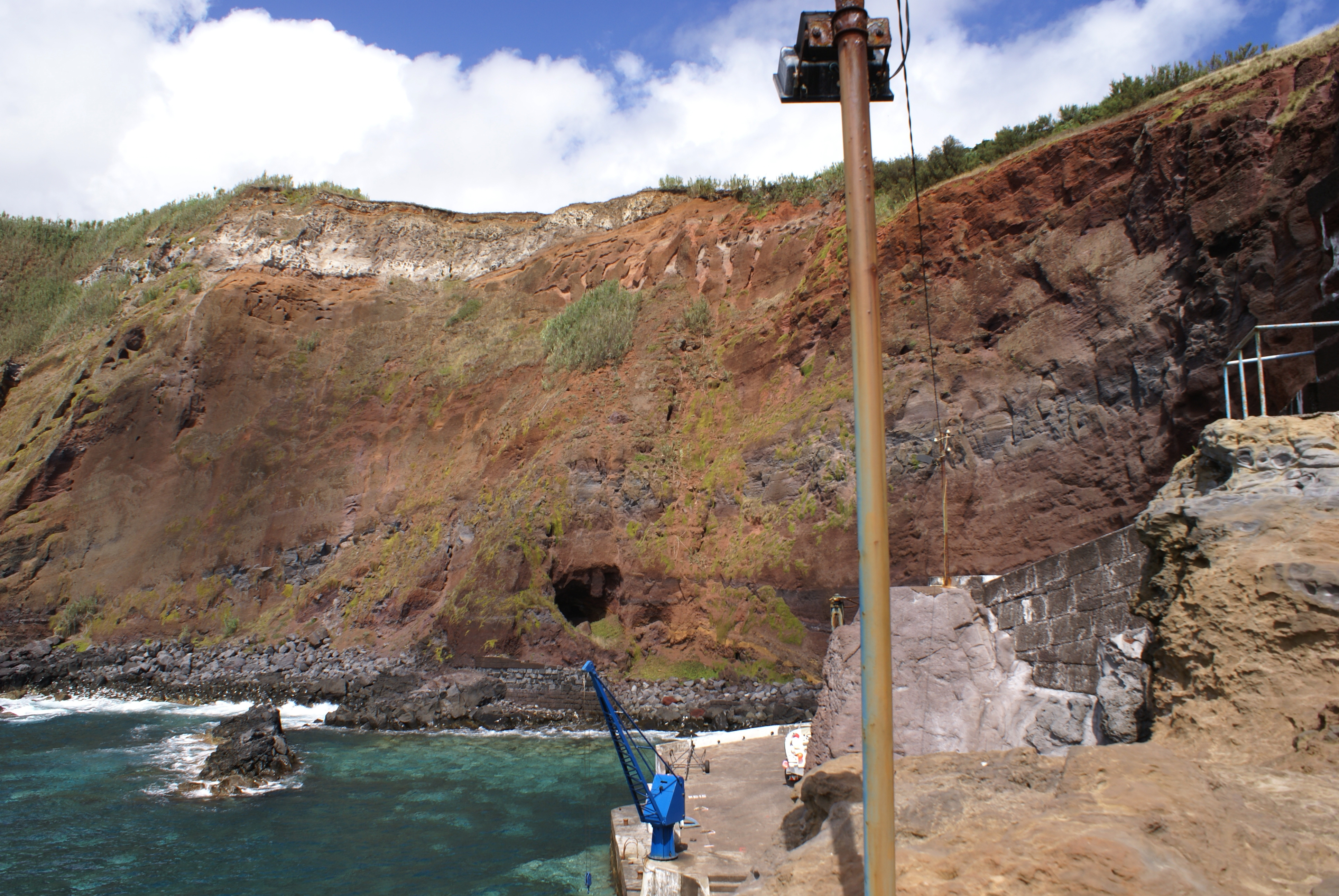 Porto do Topo, vista parcial, Calheta, ilha de São Jorge, Açores